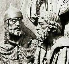 Фрагмент скульптурной группы в Великом Новгороде. См.